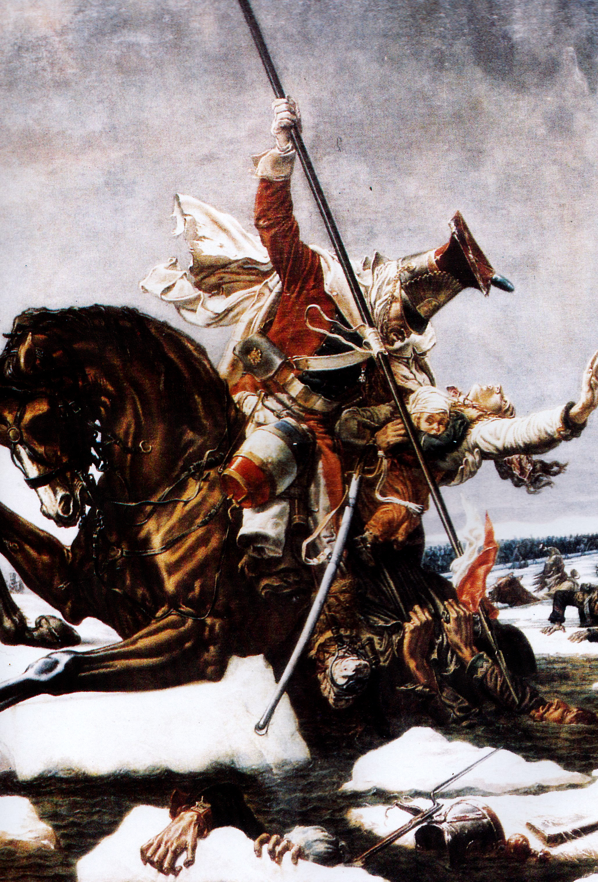 « Lancier rouge au passage de la Bérésina, 1812 ». Un lancier rouge du 2e régiment de la Garde impériale tente de sauver sa famille en traversant la Bérézina, gelée.